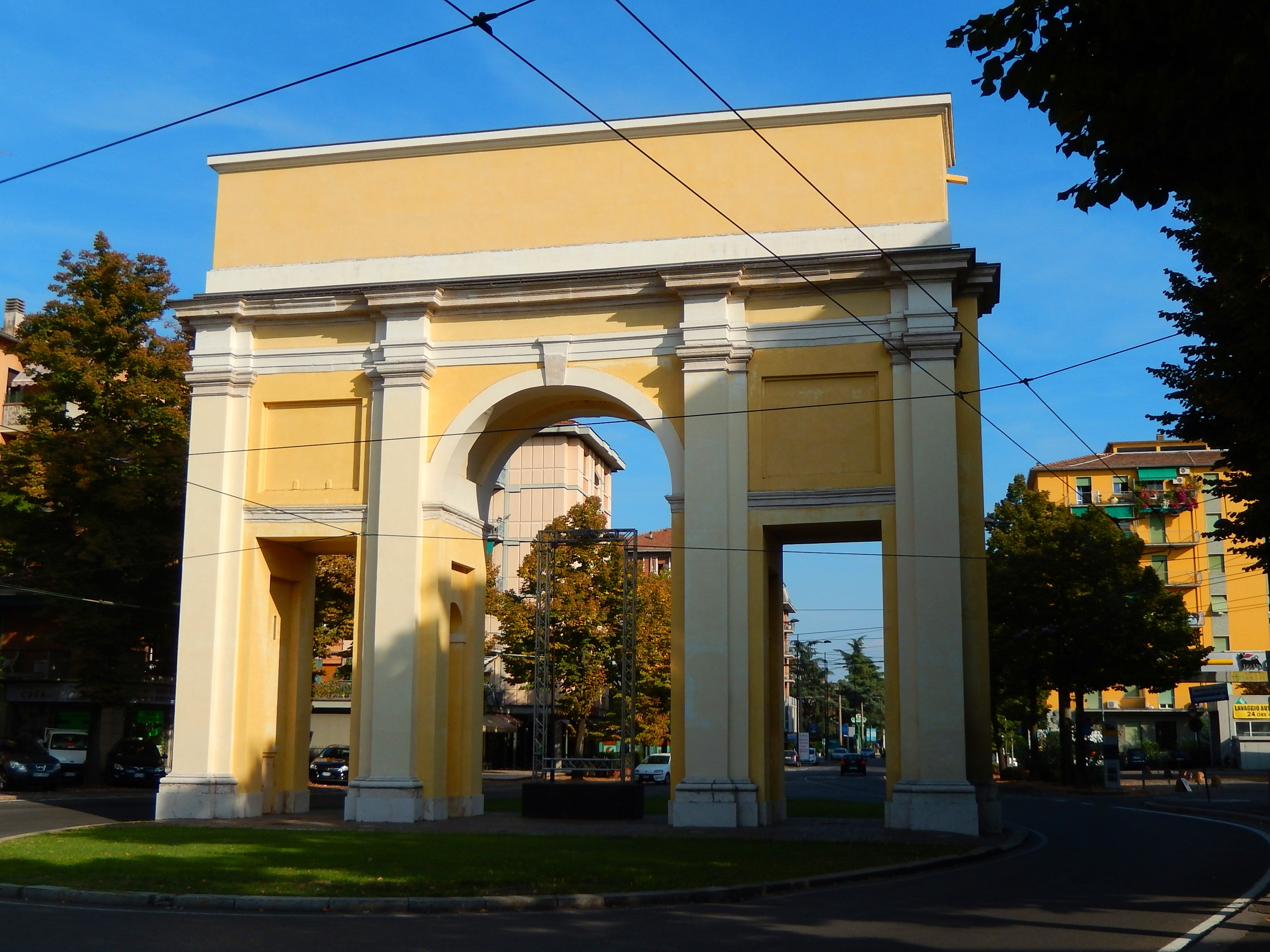 Arco di San Lazzaro, a Parma This is a photo of a monument which is part of cultural heritage of Italy.